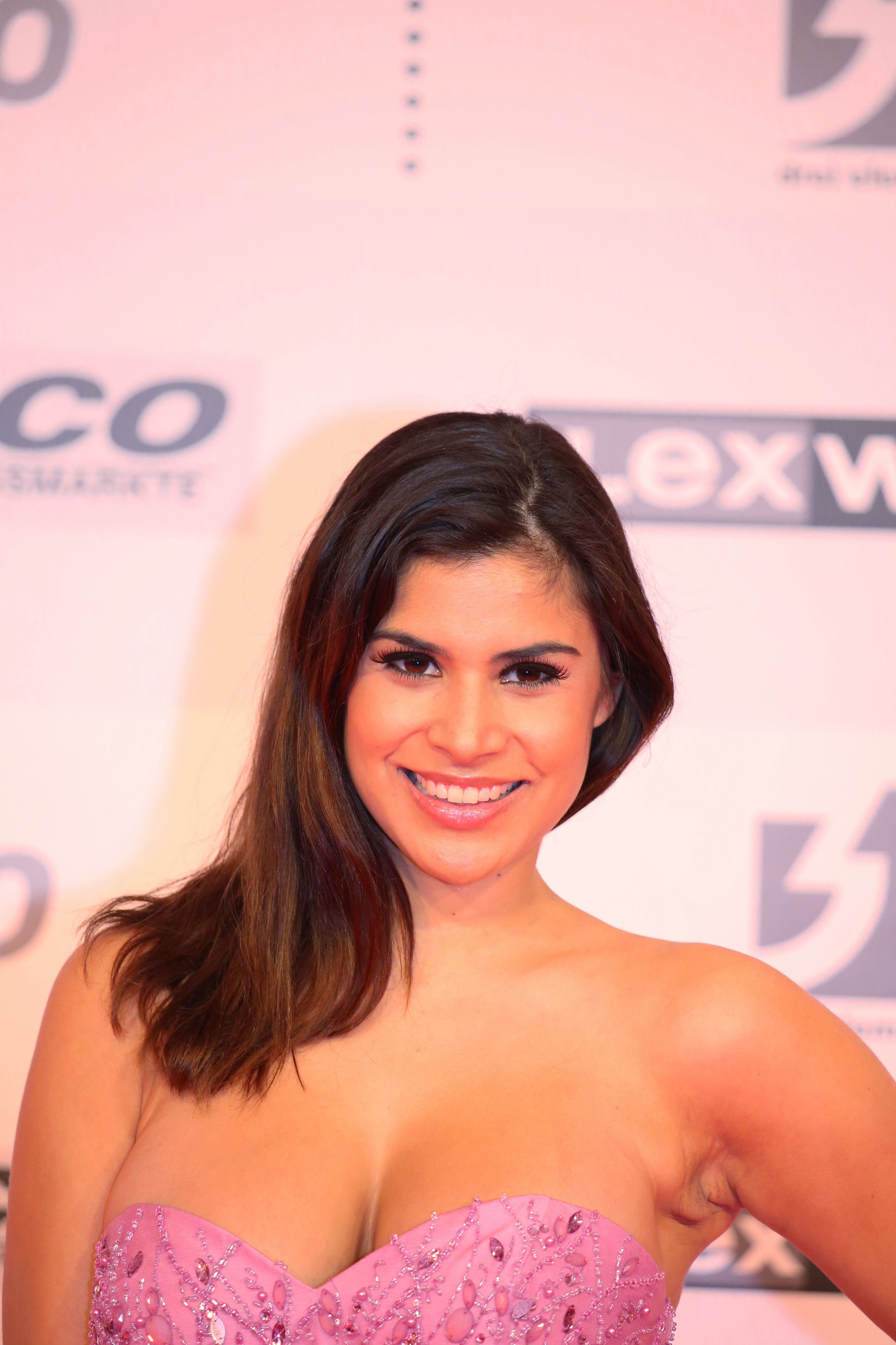 Tanja Tischewitsch bei der Kinderlachen-Gala 2017, in Dortmund.